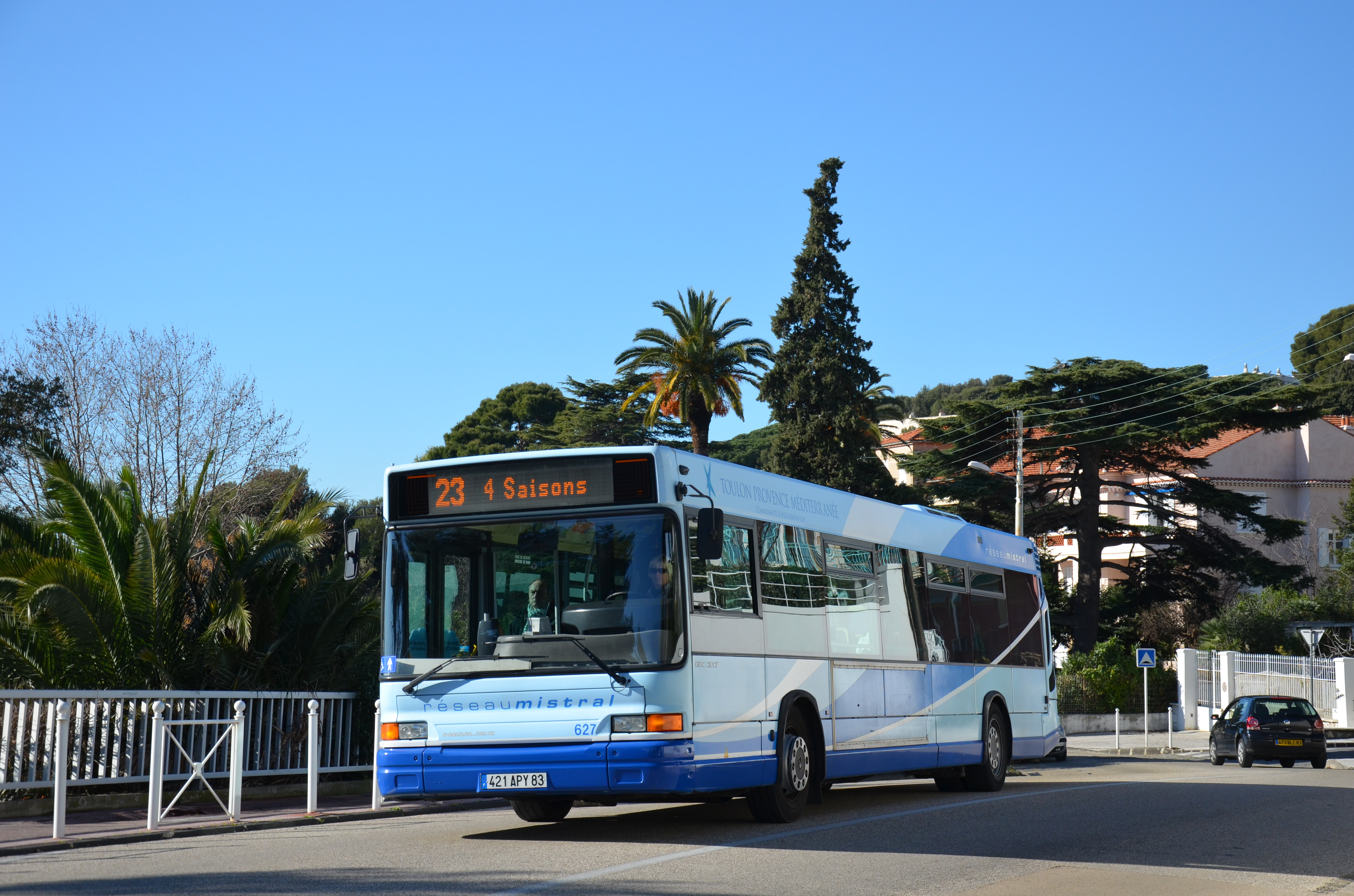 Heuliez GX 317 n°627 sur la ligne 23 du réseau Mistral de Toulon, près de l'arrêt Mourillon.